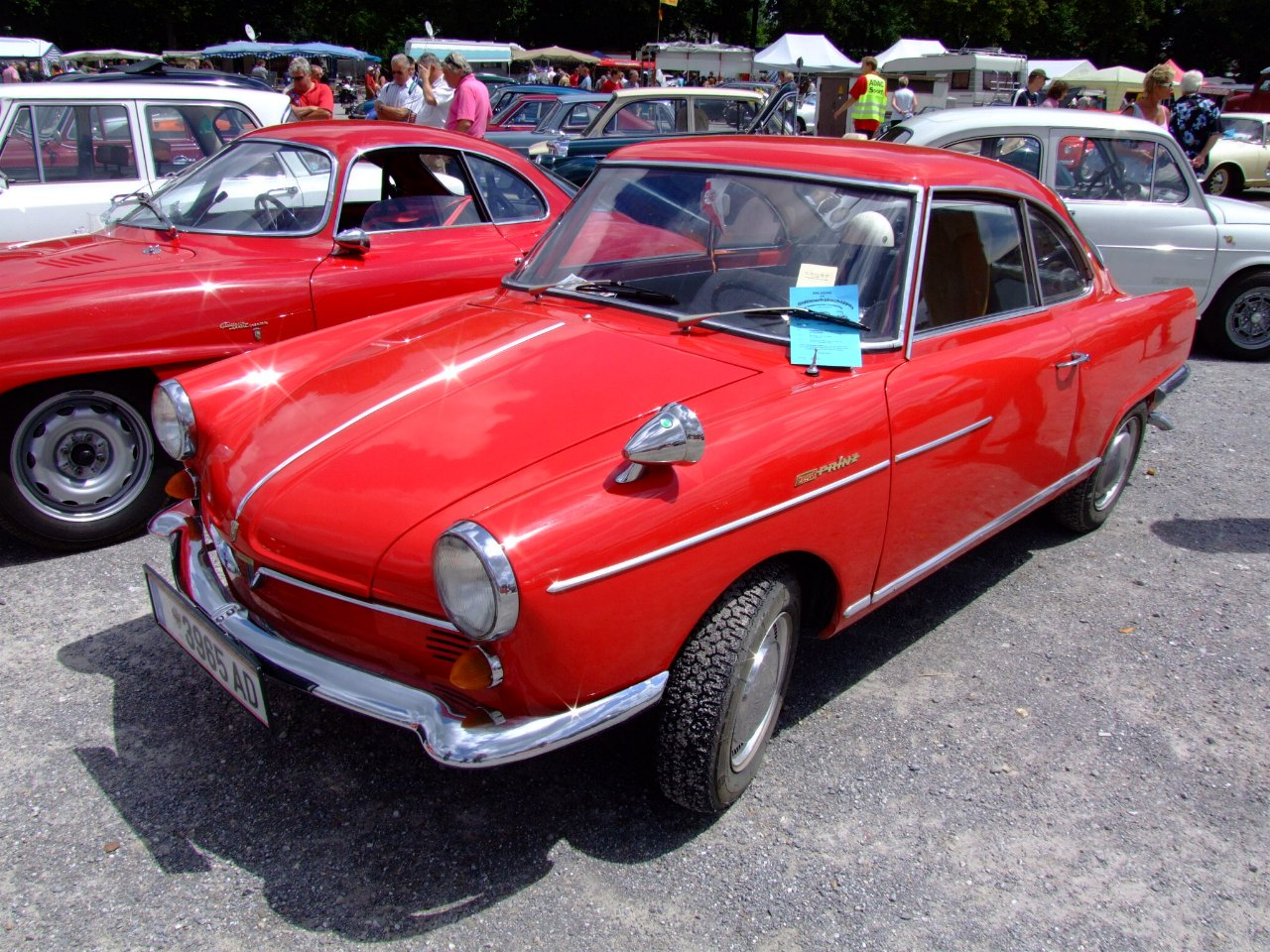 NSU SportPrinz